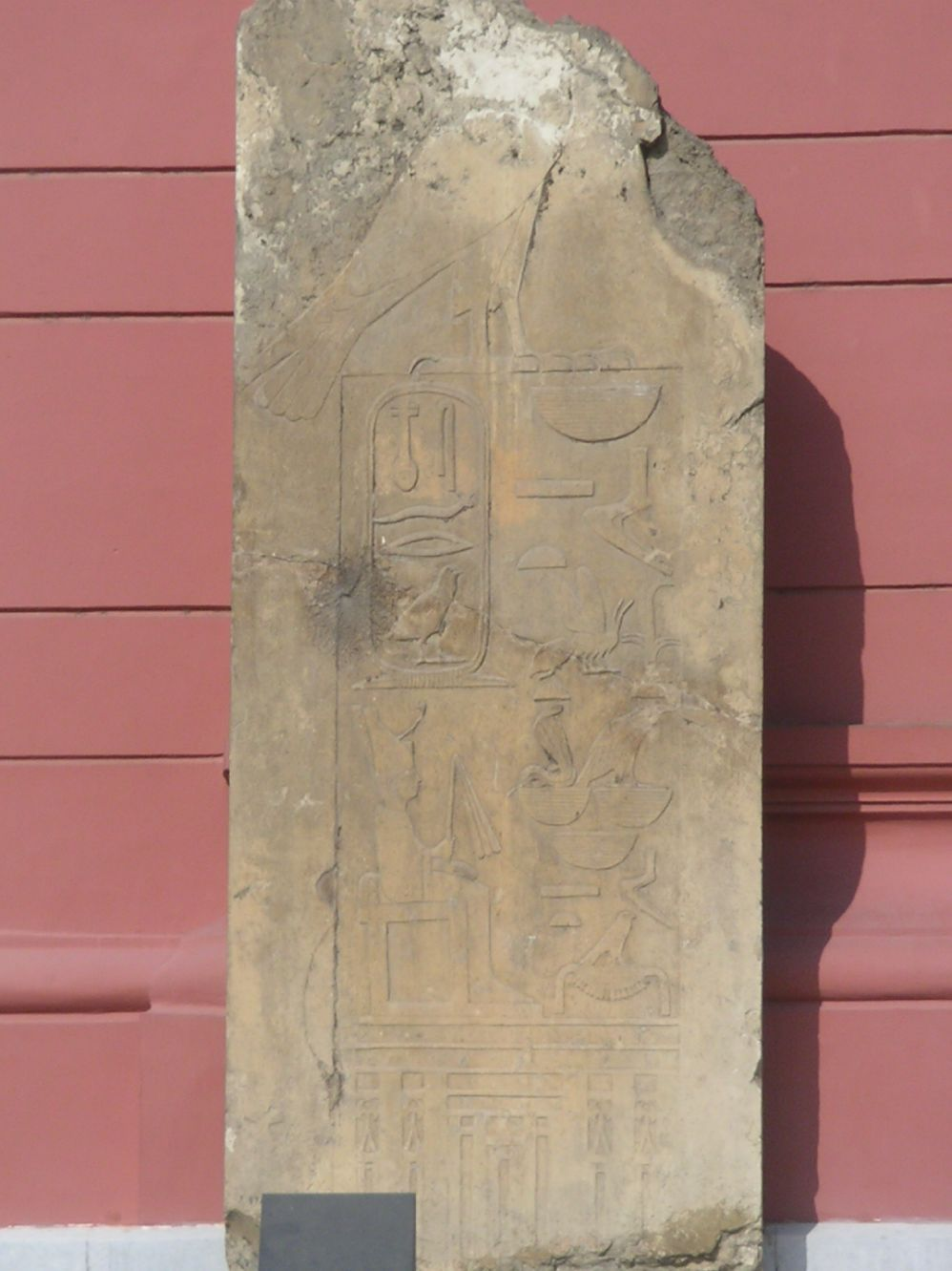 Stèle de Snéfrou aujourd'hui exposée dans les jardins du Musée du Caire - IVe dynastie égyptienne